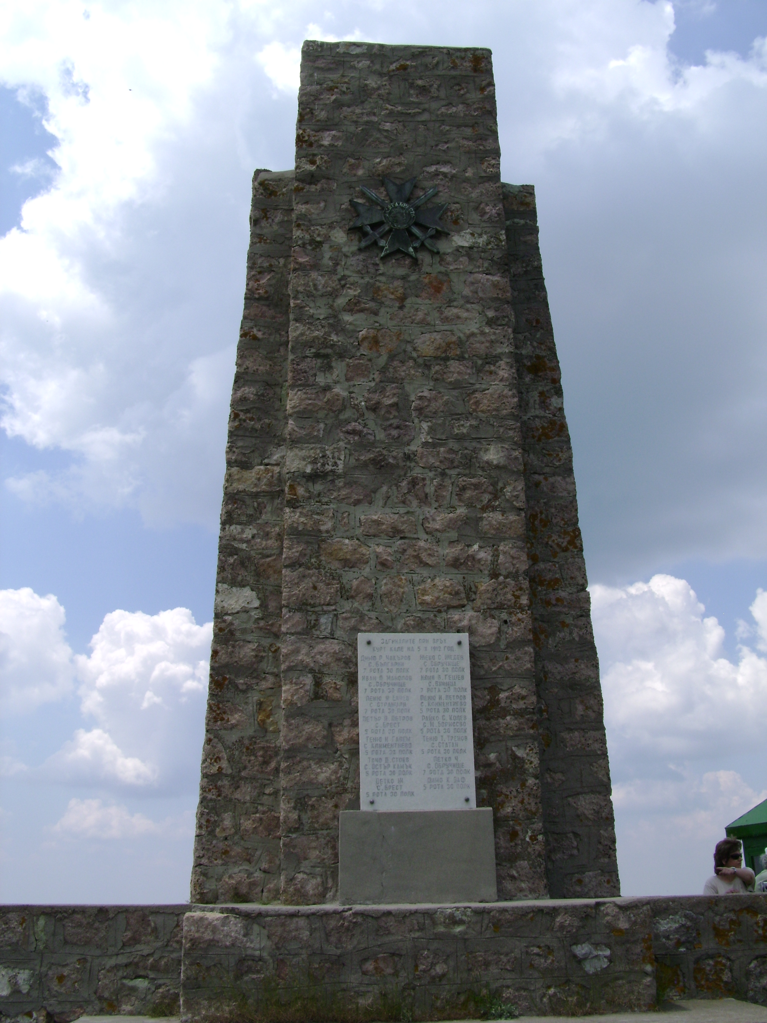 Паметникът на връх Шейновец